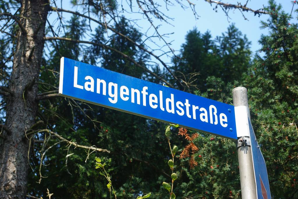 Wegweiser Langenfeldstraße in 83435 Bad Reichenhall/83457 Bayerisch Gmain